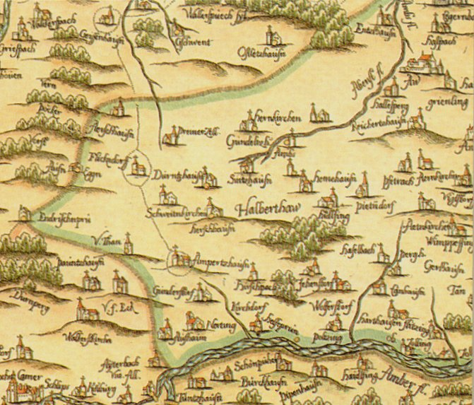 Summary Ausschnitt aus dem Kupferstichnachdruck von Petrus Weinerus (1579), nach dem Original-Holzschnitt von Philipp Apian (1568) im Stadtmuseum Ingolstadt